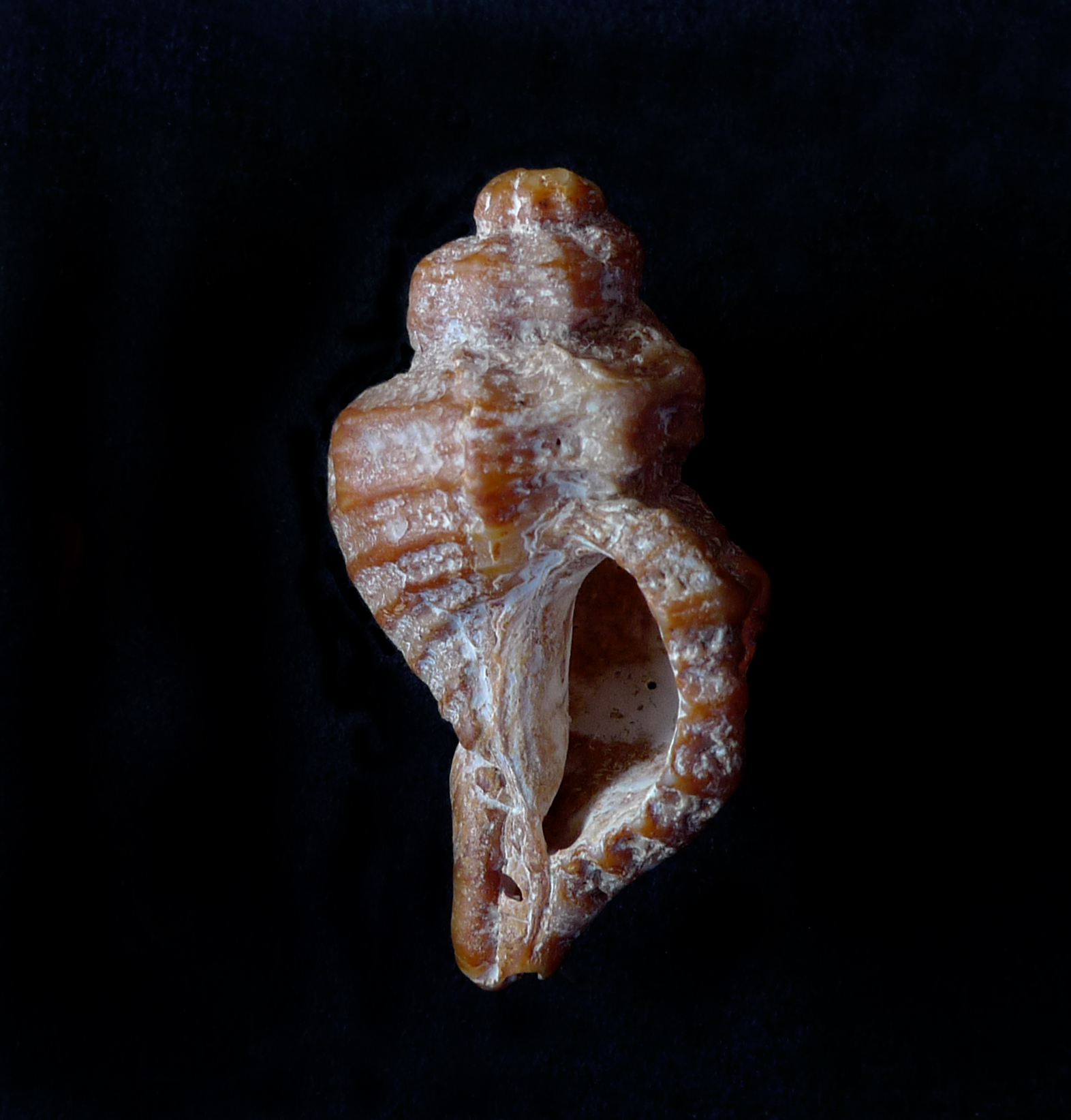 Ocenebra erinacea - Austernbohrer; North-Wales/Britain